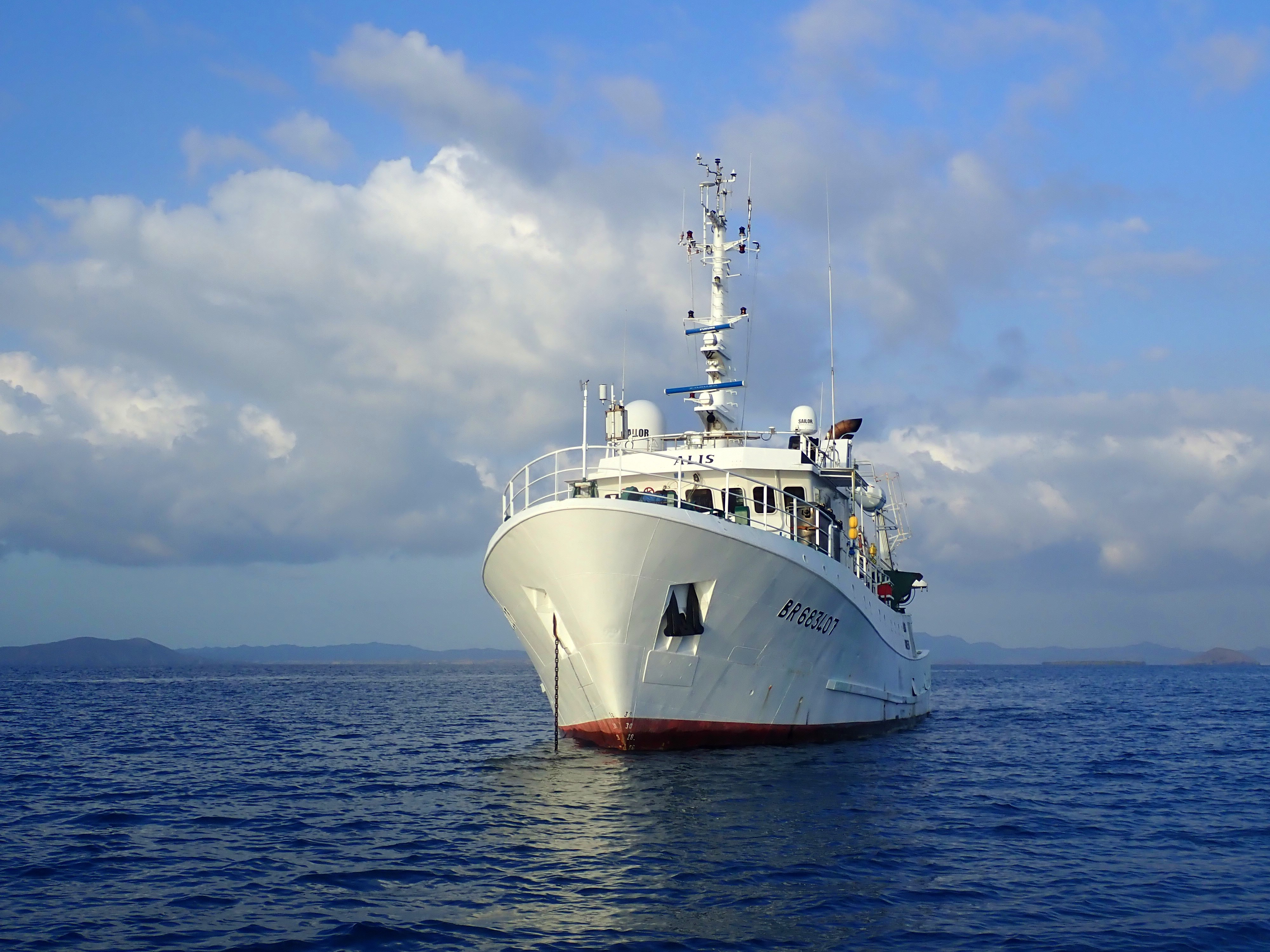 Photographie du navire océanographique français "L'Alis", au nord du lagon de Koumac, en Nouvelle-Calédonie, en novembre 2019.